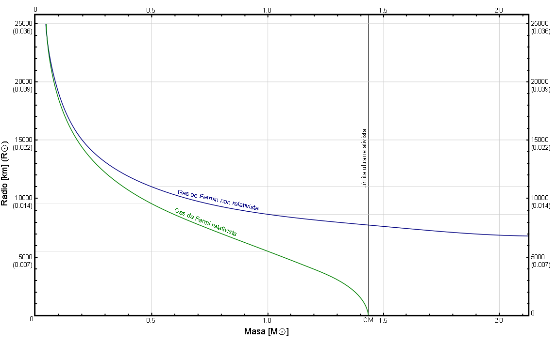 Relacións masa-radio para enanas brancas[1] consistindo nunca gas frío de Fermi con A/Z=2. "CM" denota a masa límite de Chandrasekhar.